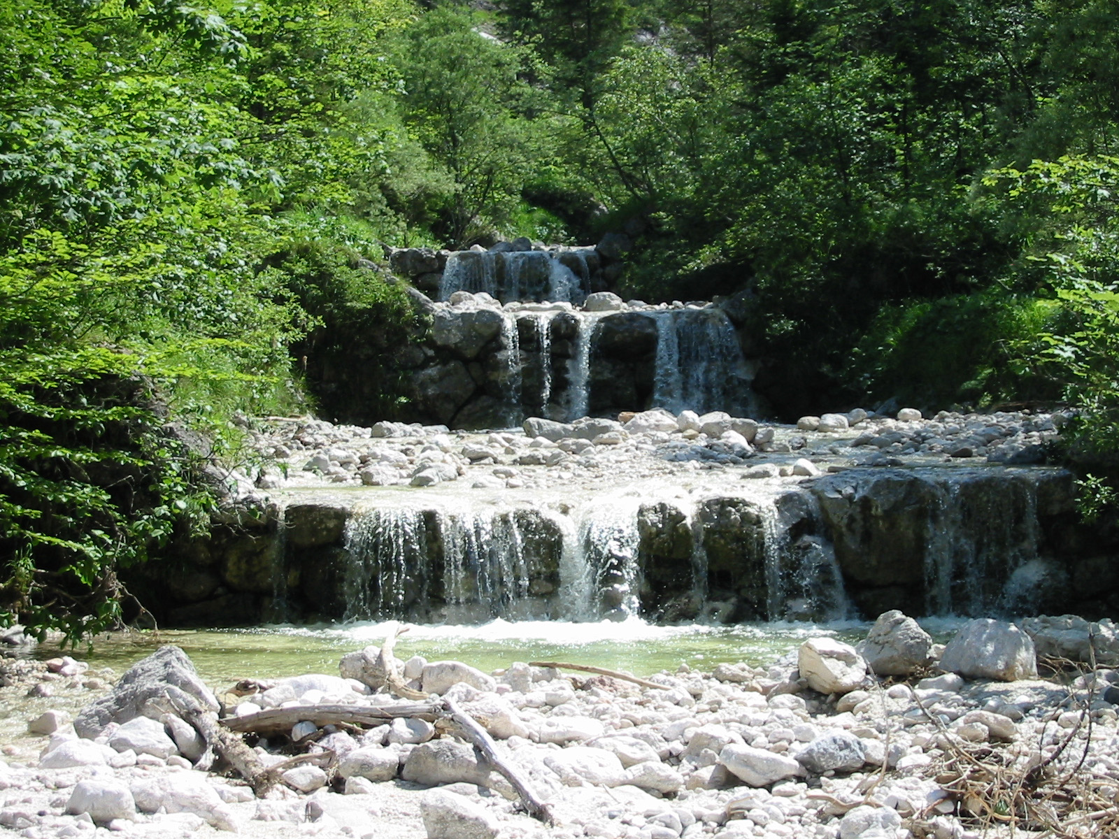 Mehrere Geröllsperren im Mittellauf des Weißbach in Bayern. Sie wurden um etwa 1910 errichtet und bestehen vorwiegend aus handbehauenen Natursteinen, sprich Marmorblöcken. Die meisten Sperren sind zwischen einem und zwei Metern hoch - im oberen Lauf sind einige jedoch zwischen fünf und zehn Meter hoch, diese sind zusätzlich mit Beton befestigt aber dennoch damals von Hand gebaut.